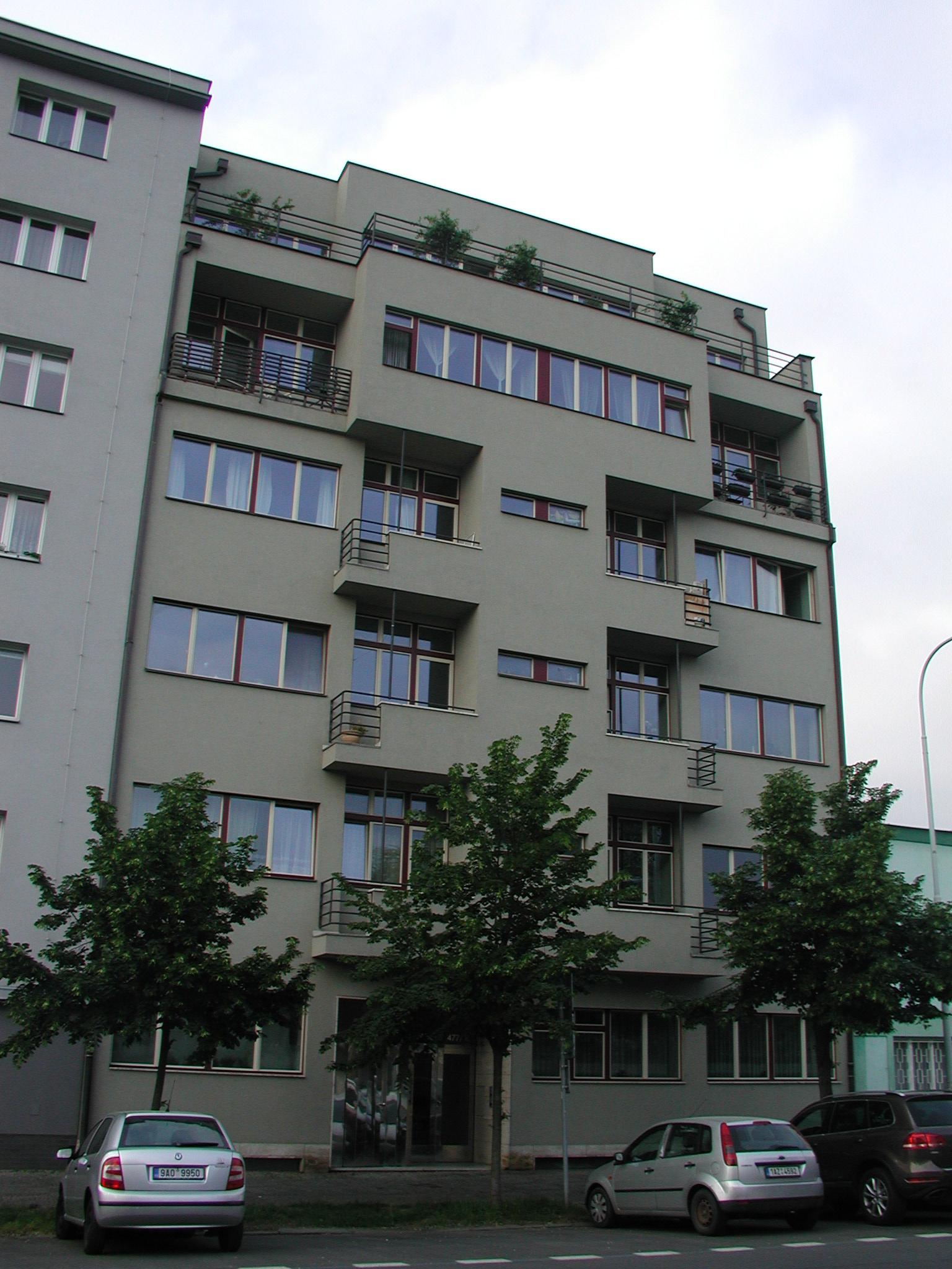 Praha - Holešovice, U Průhonu 16 (Eugen Rosenberg, 1936)